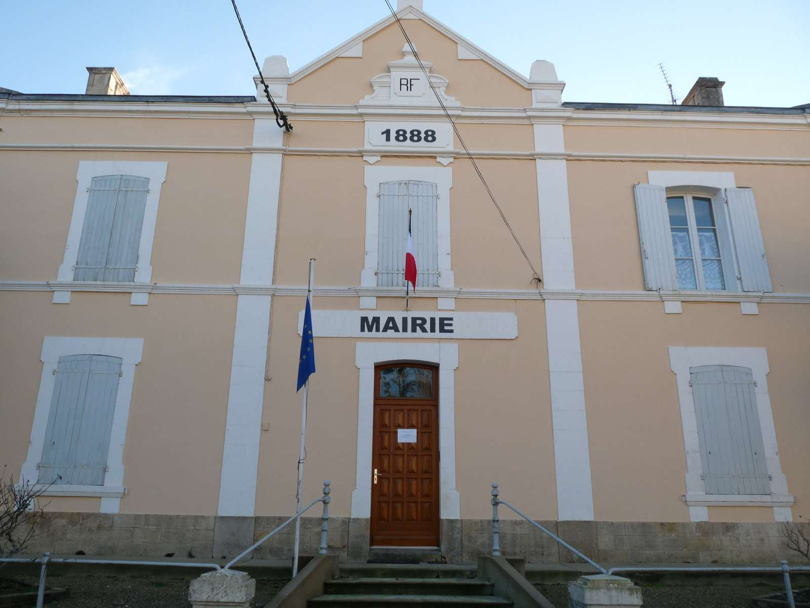 mairie de Juillé, Charente, France